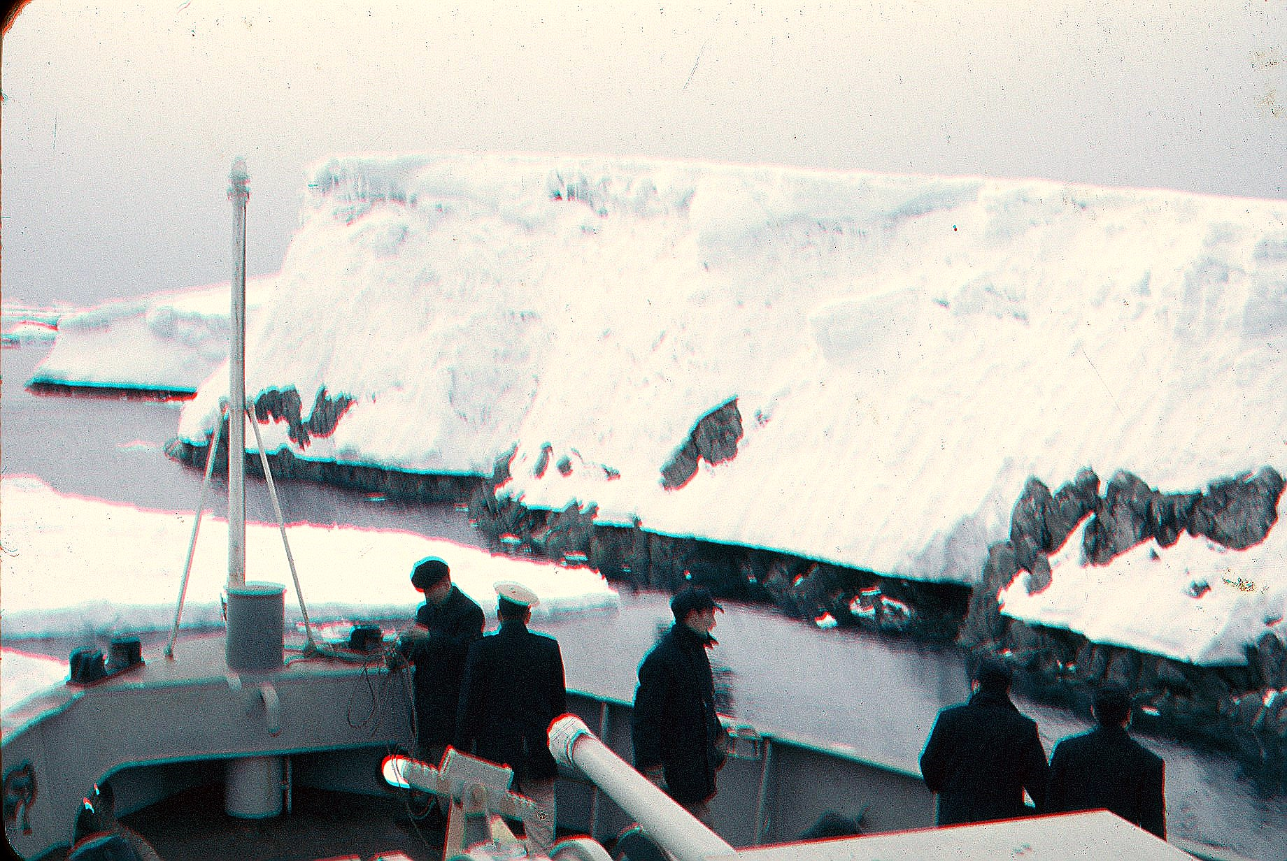 Navegando el canal Meek que da acceso a islas Argentinas lugar en que se encuentra la base inglesa "F"